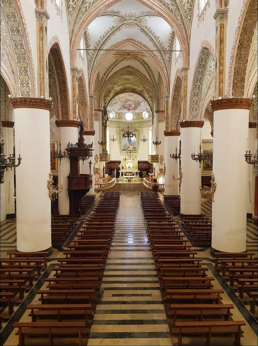 Vista interna della navata centrale della Basilica di Santa Maria delle Grazie a Cortemaggiore (PC)